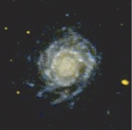 NGC 3147